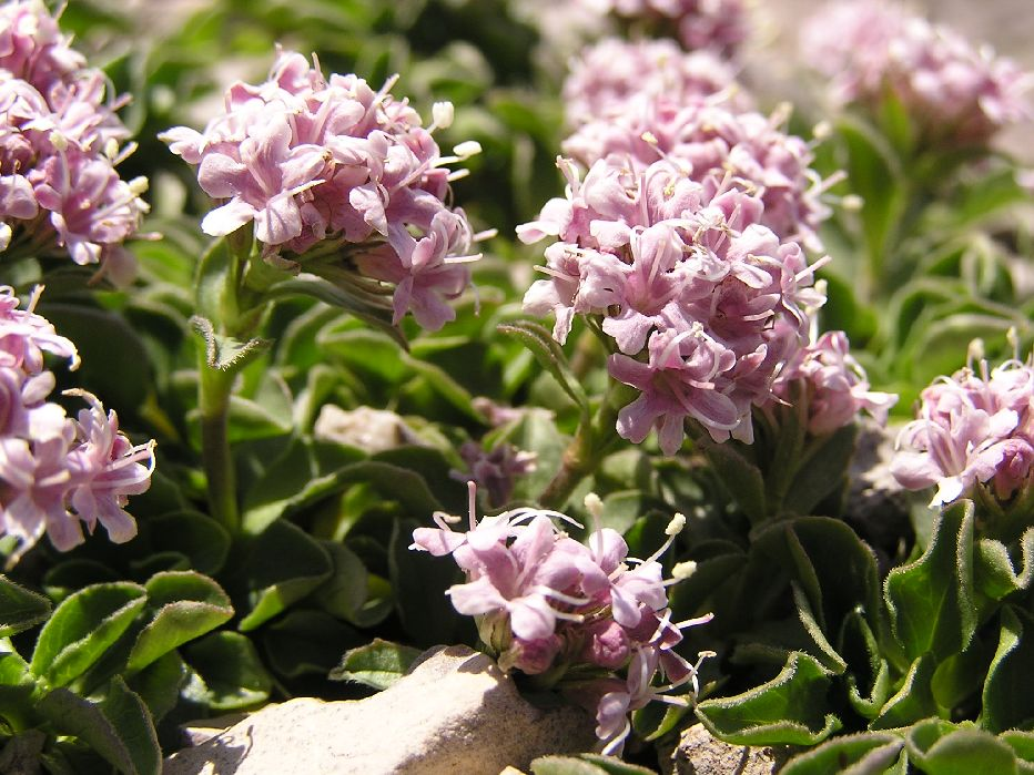 Valeriana supina auf dem Allgäuer Hauptkamm.